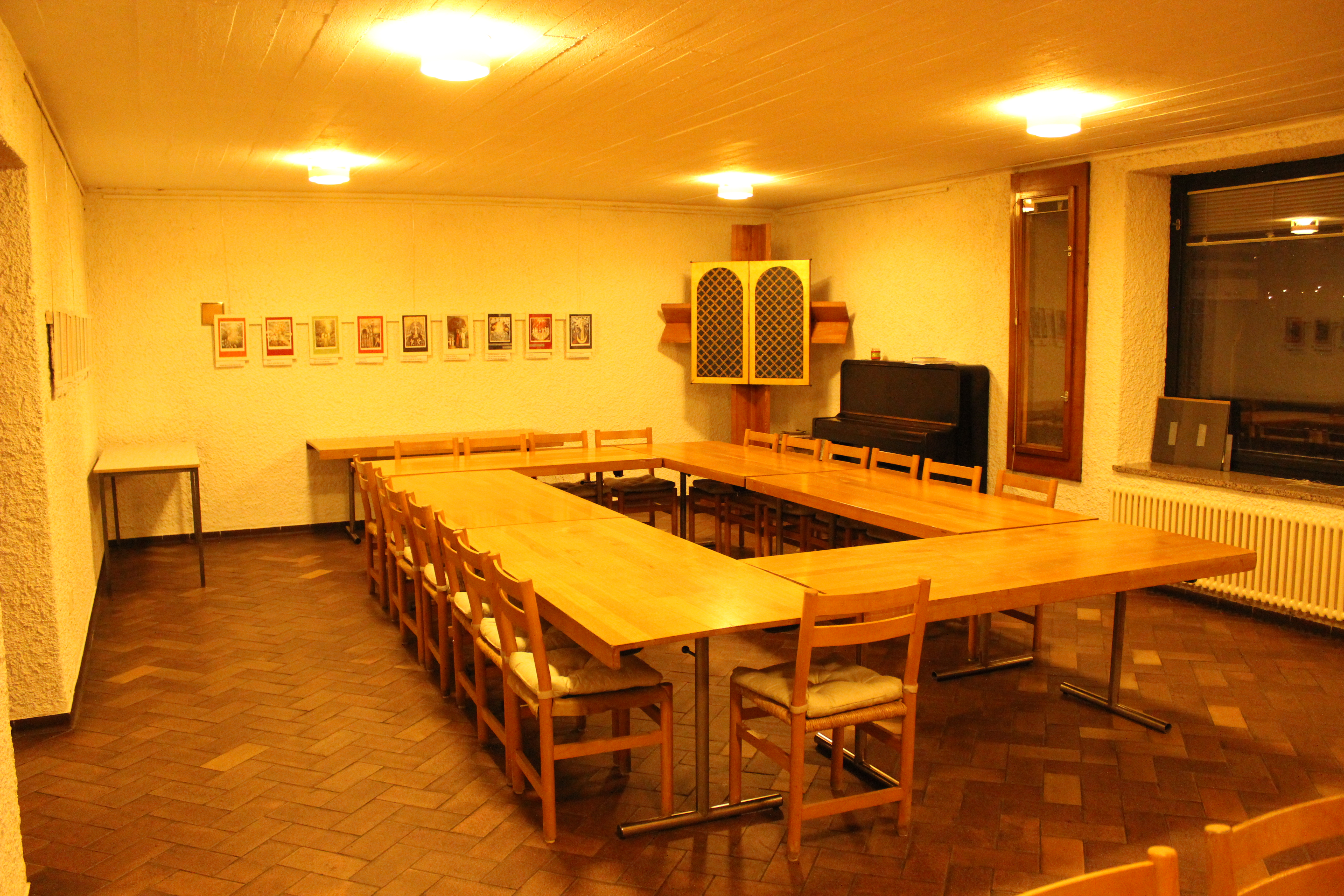 Pohled z rohu do malého sálu v kostele U Jákobova žebříku v pražských Kobylisích.